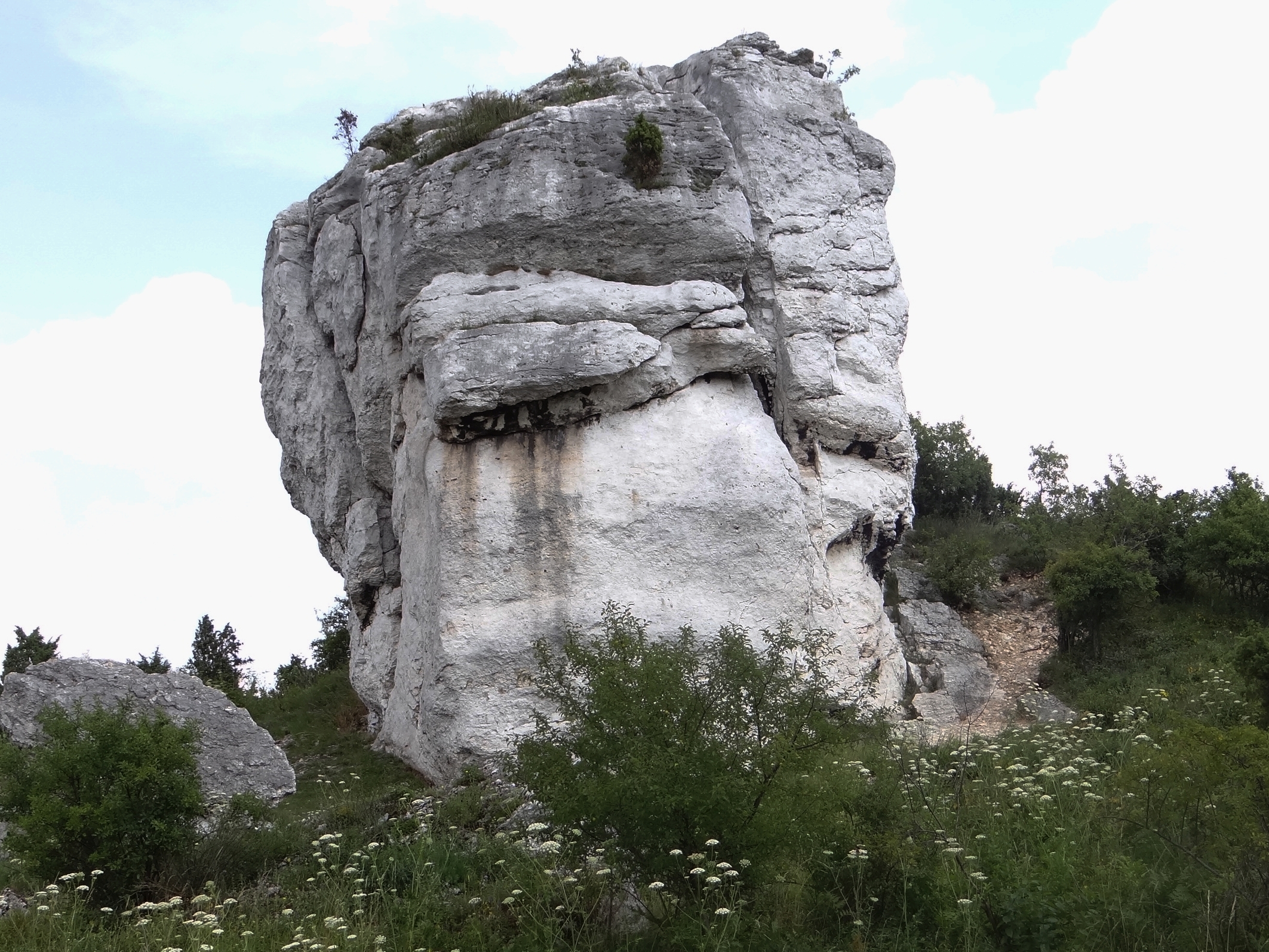 Skała Szafa w Grupie Dziewicy koło Olsztyna